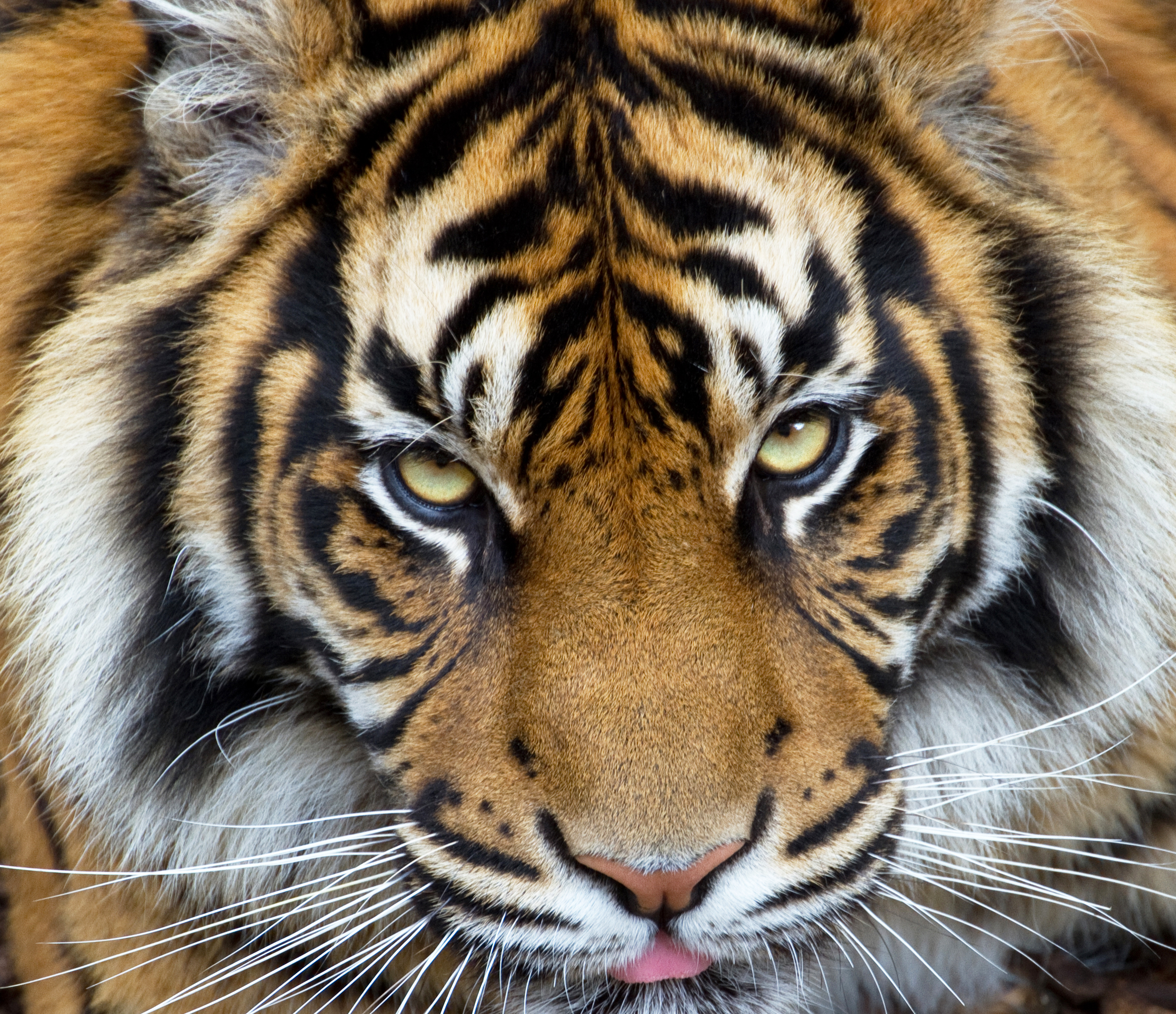 Sumatran Tiger 3